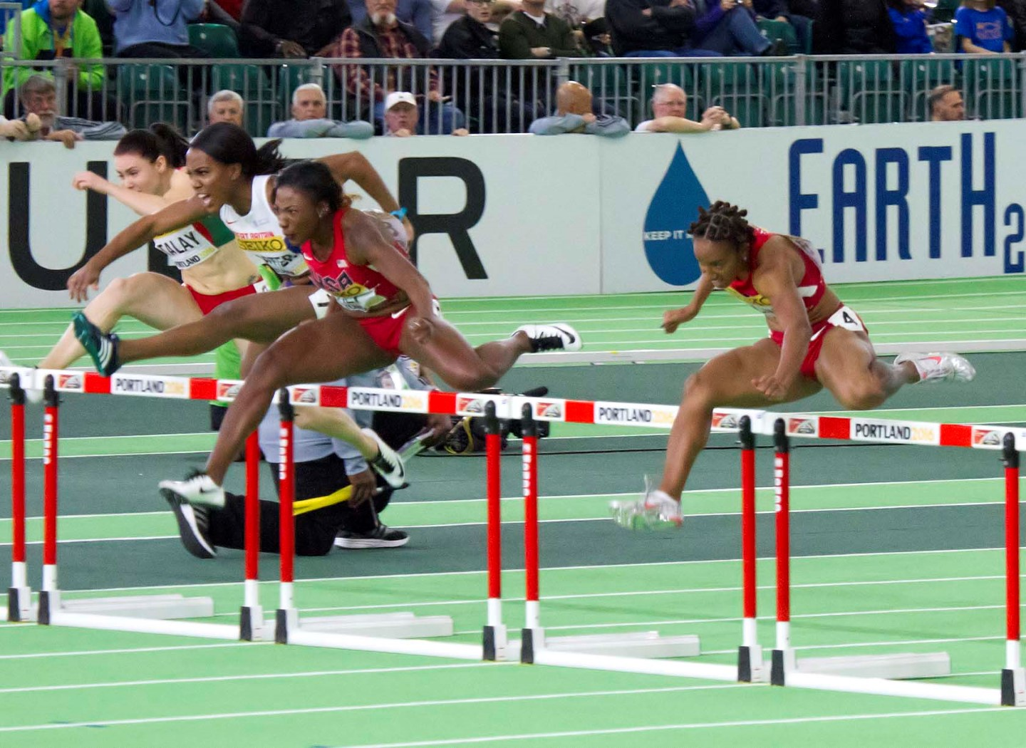 276 finale 60mH